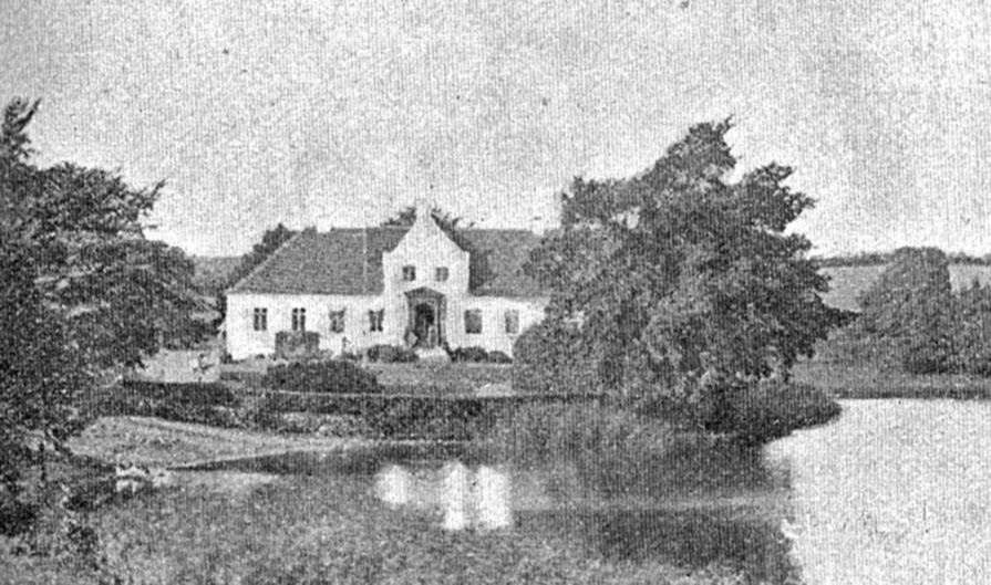 Søbo er en gammel sædegård, som nævnes første gang i 1442. Søbo ligger i Jordløse Sogn, Sallinge Herred, Haarby Kommune. Hovedbygningen er opført 1720`erne.